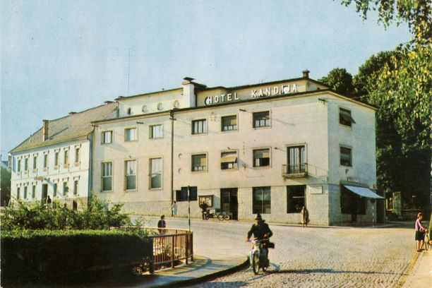 Prizorišče 1. umetniške razstave v Novem mestu je bil nekdanji Hotel Kandija oz. Hotel pri Windischerju. Razglednico iz šestdesetih let prejšnjega stoletja hrani Knjižnica Mirana Jarca Novo mesto.